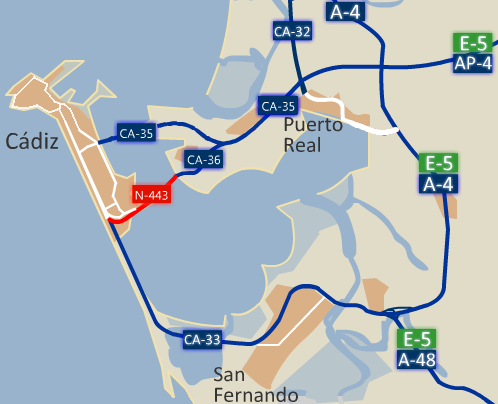 Carreteras de la Bahía de Cádiz entre Cádiz, San Fernando y Puerto Real